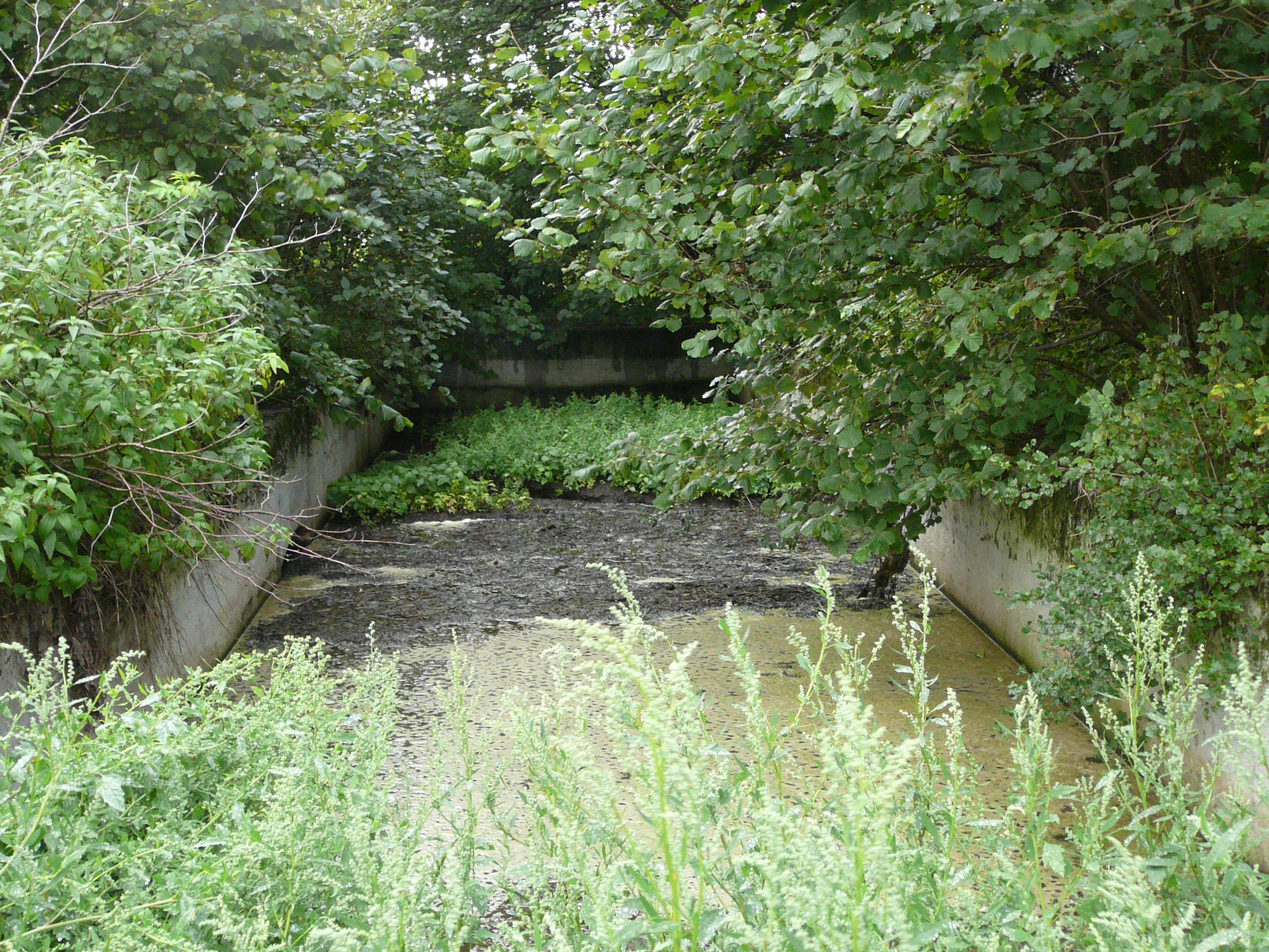 Opera 1bis Dobbiaco